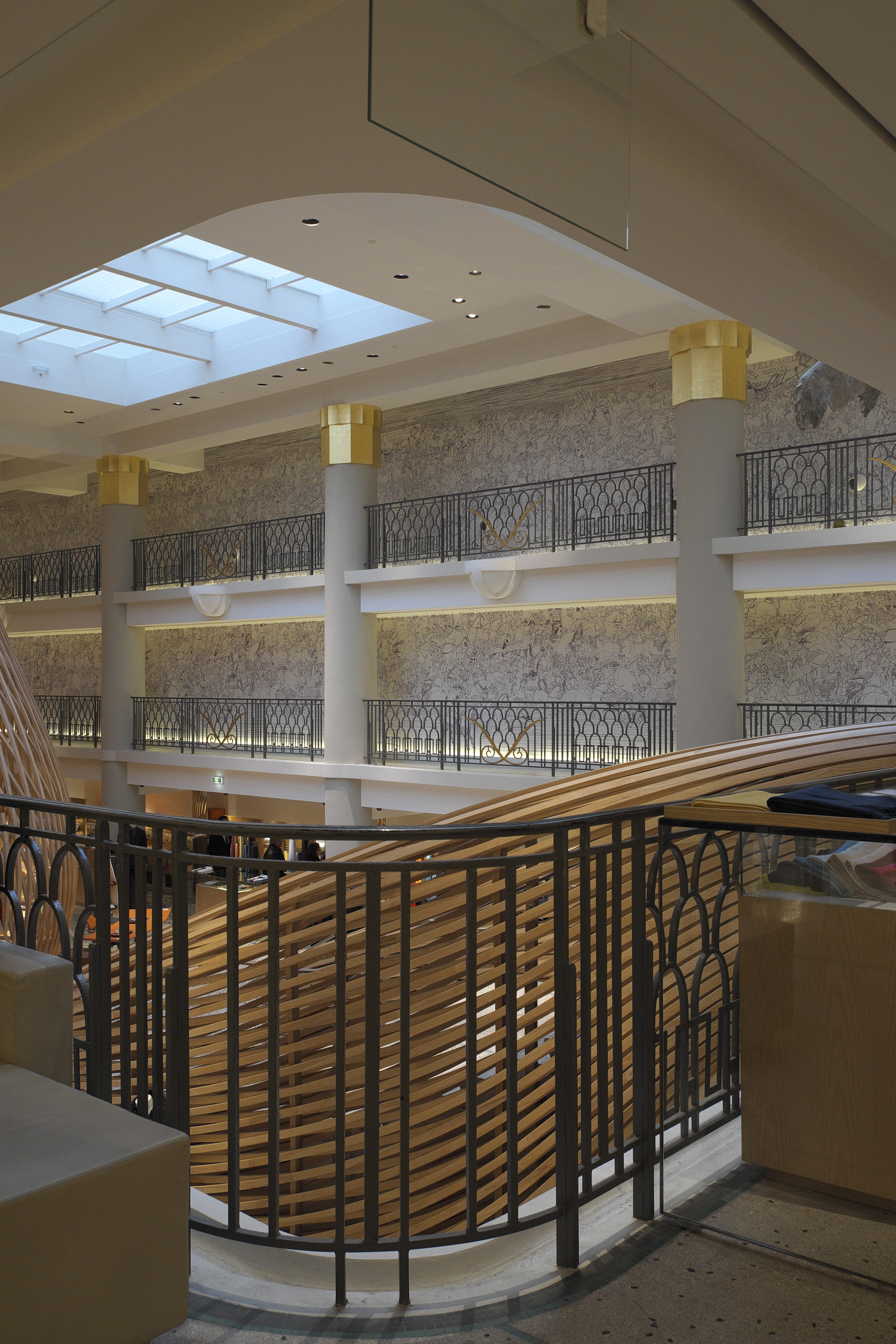 Ehemaliges Schwimmbad (Piscine Lutetia), 17, rue de Sèvres im 6. Arrondissement von Paris, 1935 von dem Architekten Lucien Béguet gebaut, seit 2010 Verkaufsraum von Hermès